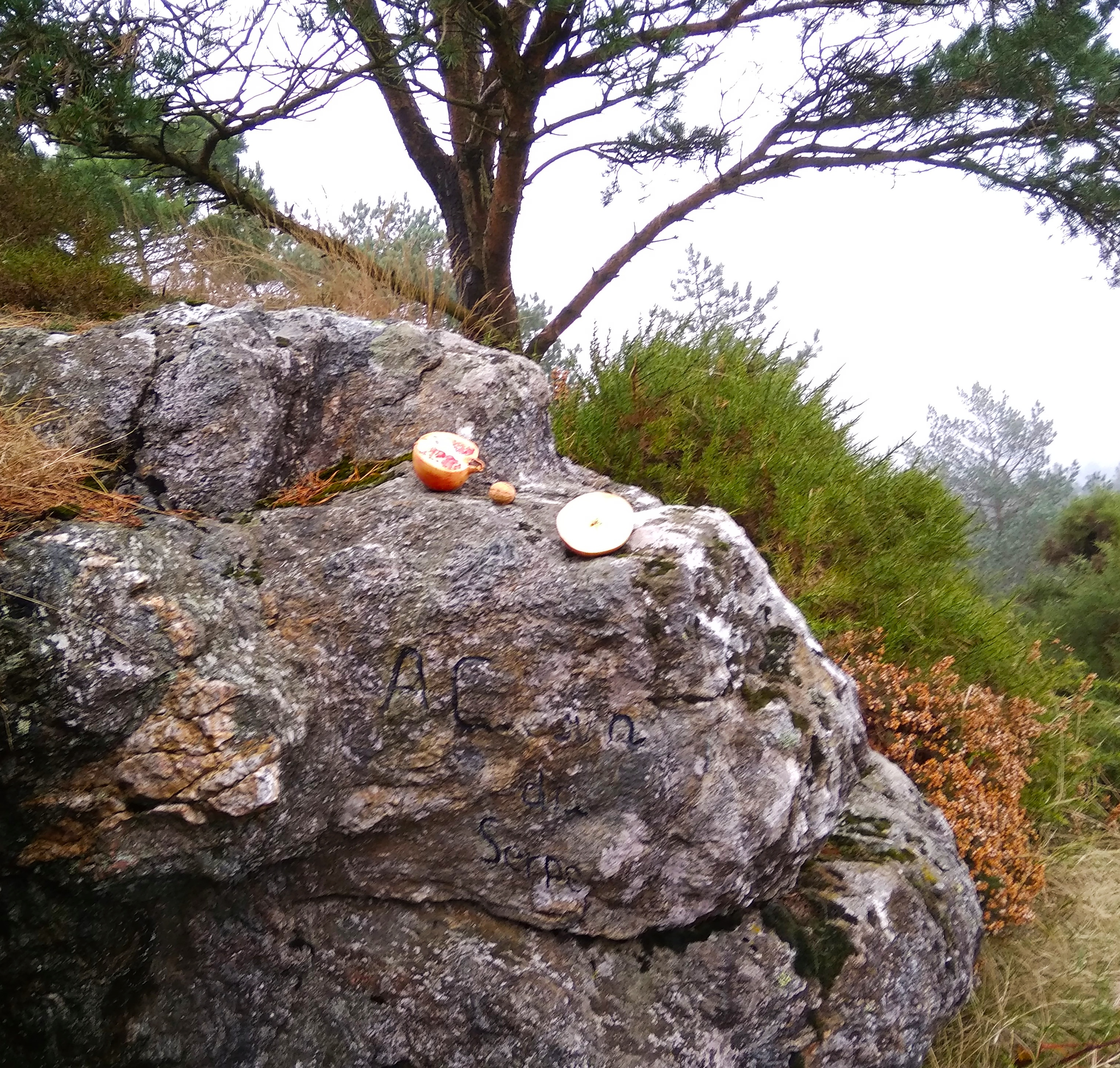 Fotografía de rocja con inscrición no monte Cova da Serpe. Fotografía realizada no tempo do Samaín.